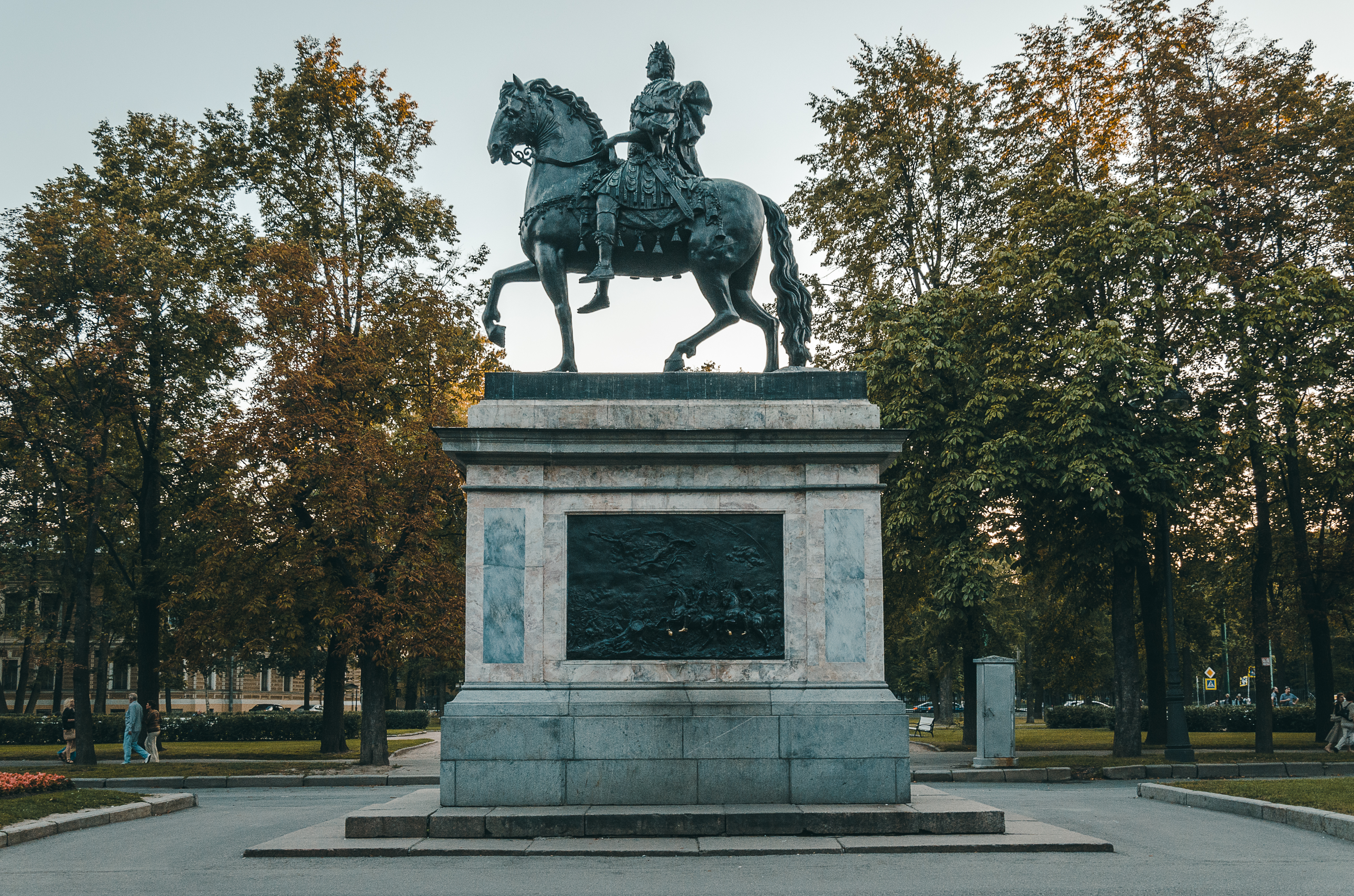 Памятник Петру I и аллея каштанов: Кленовая улица, Центральный район, Санкт-Петербург